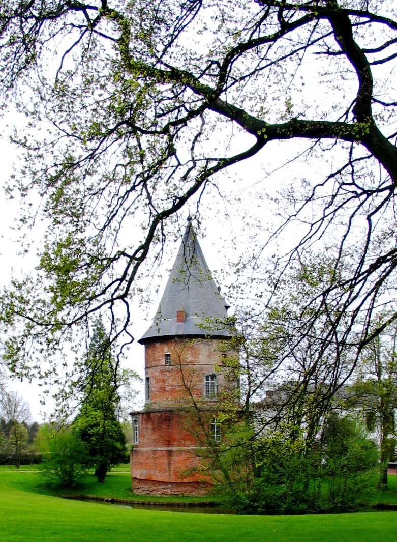 De Rentmeesterij van Alden Biesen in Diepenbeek